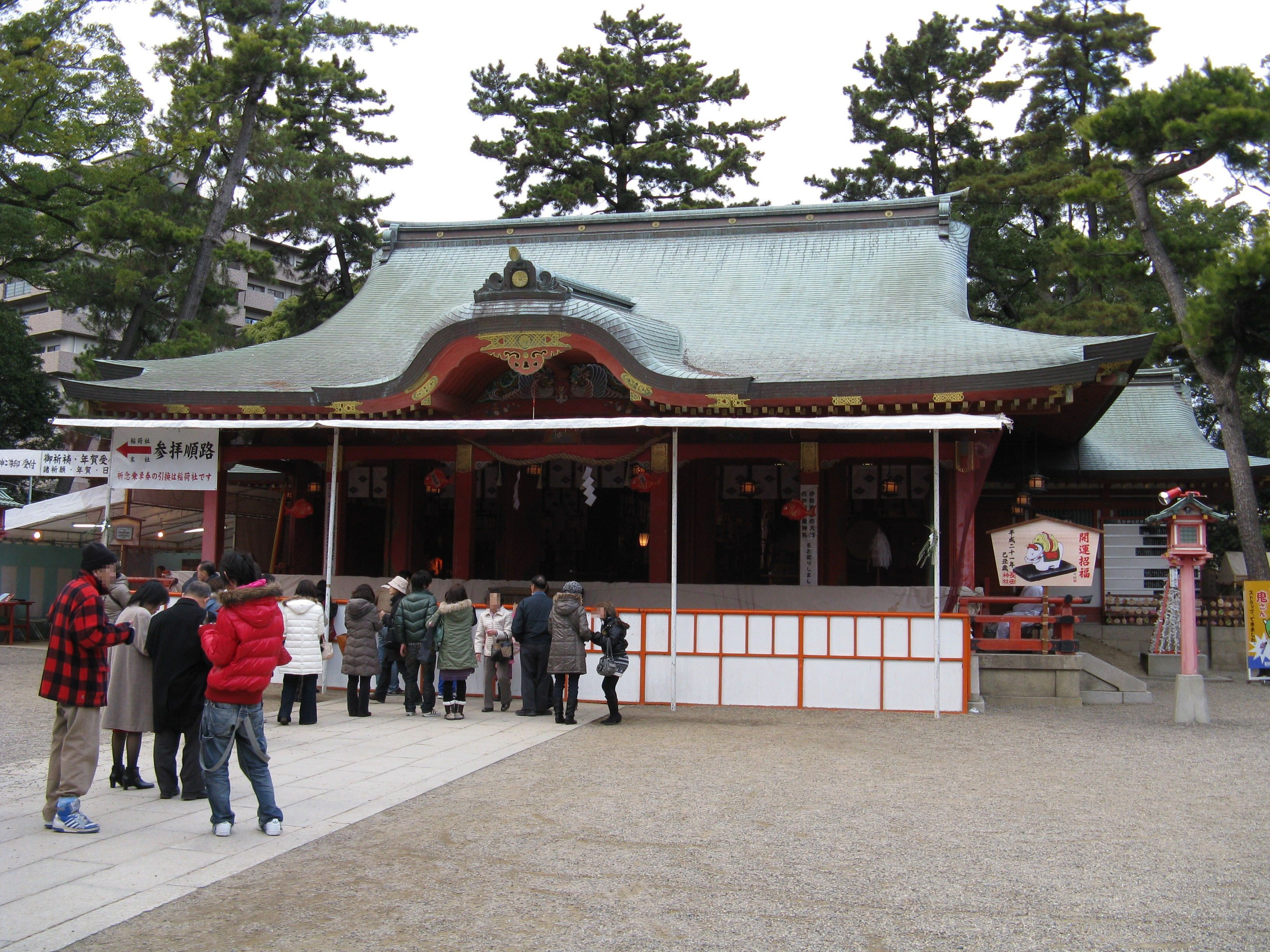 長田神社 拝殿